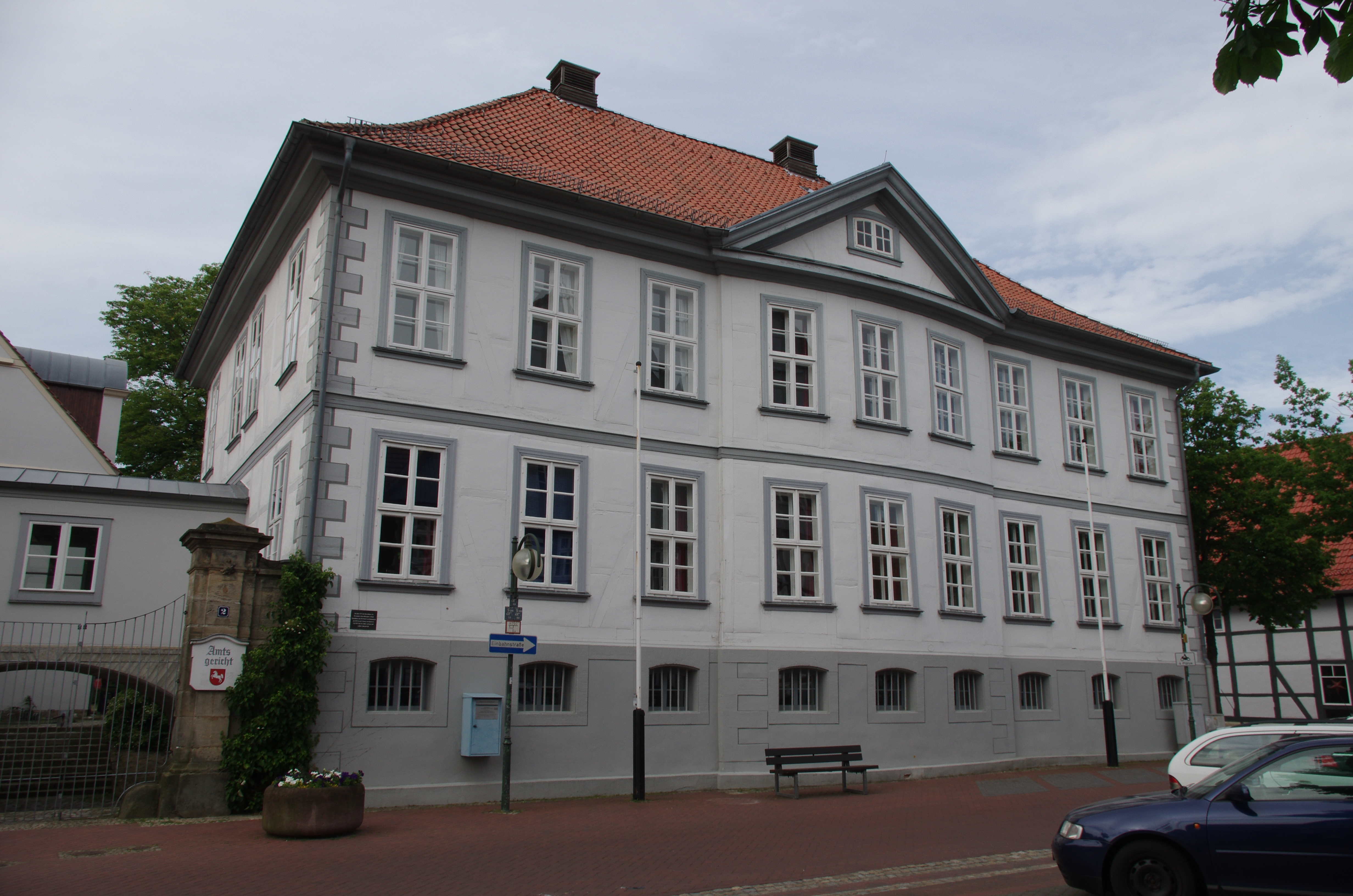 Springe in Niedersachsen. Das Haus, die Adresse steht im Namen der Datei, steht unter Denkmalschutz.